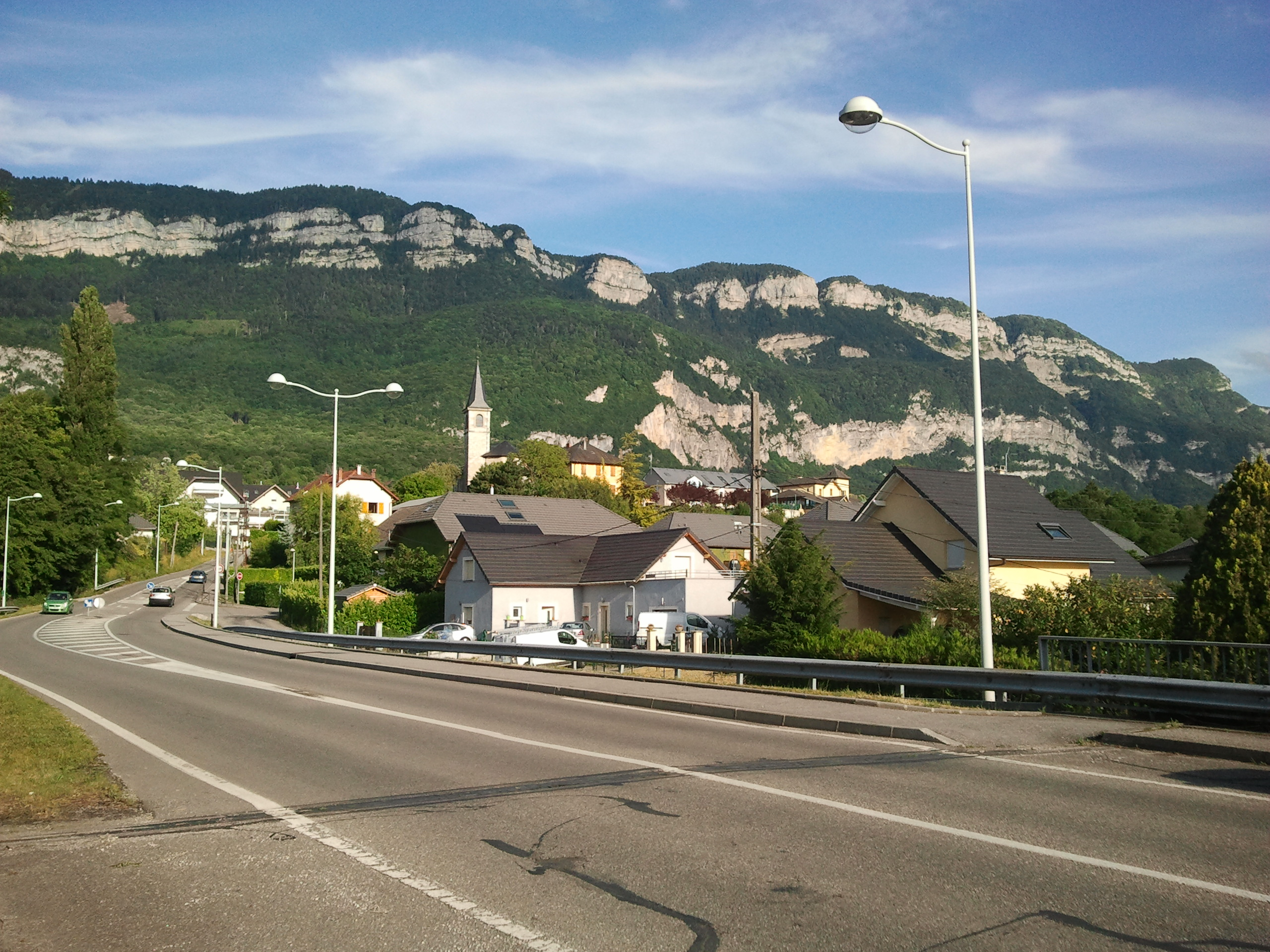 D913 - Route du Revard